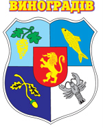 Герб міста Виноградів